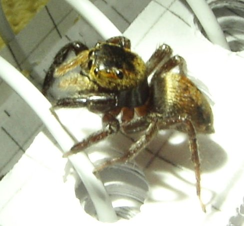 Female adult Hasarius adansoni, caught in Cologne Zoo Aquarium. One square on paper measures 5 millimeters.